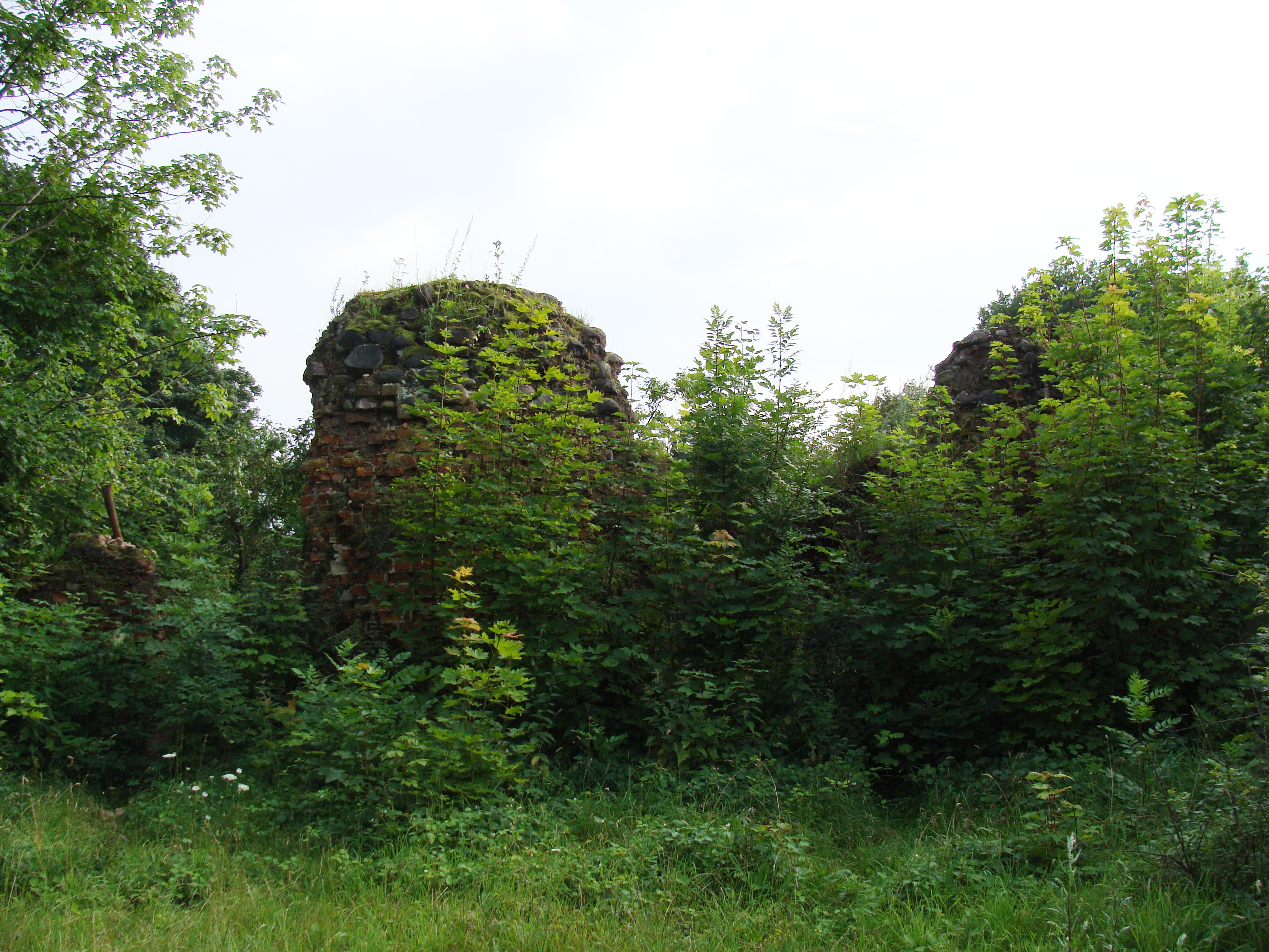 Руины замка Фишхаузен: Приморск, Балтийск, Калининградская область